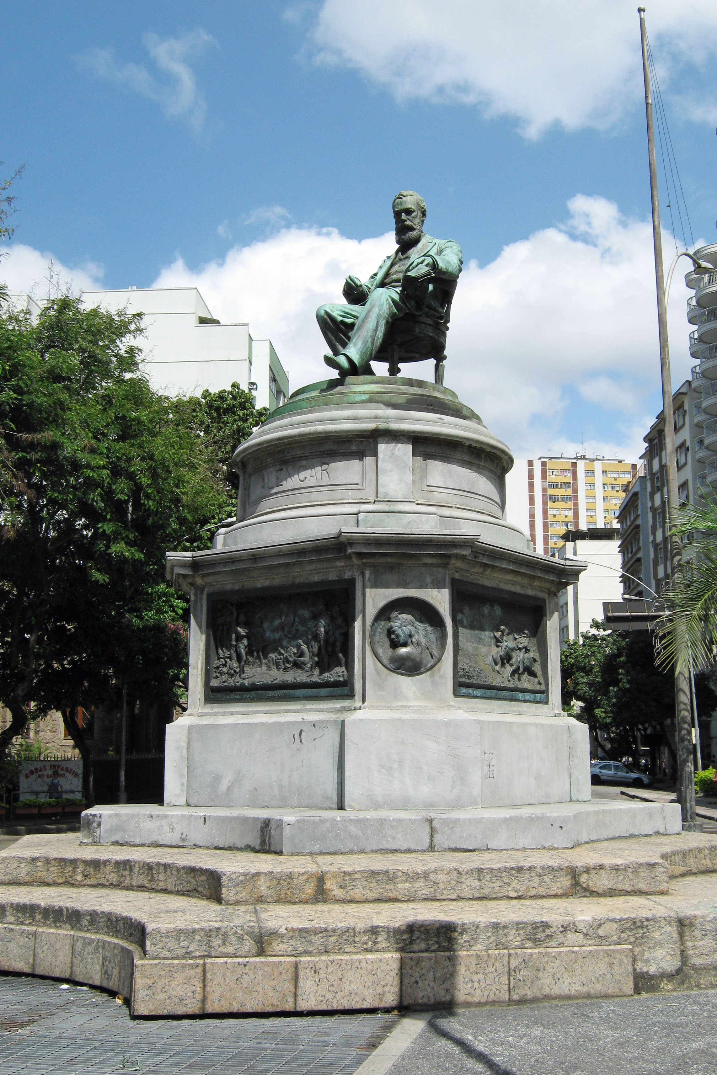 Monumento a José de Alencar. A estátua de José de Alencar é de bronze e foi modelada pelo professor Rodolfo Bernardelli.